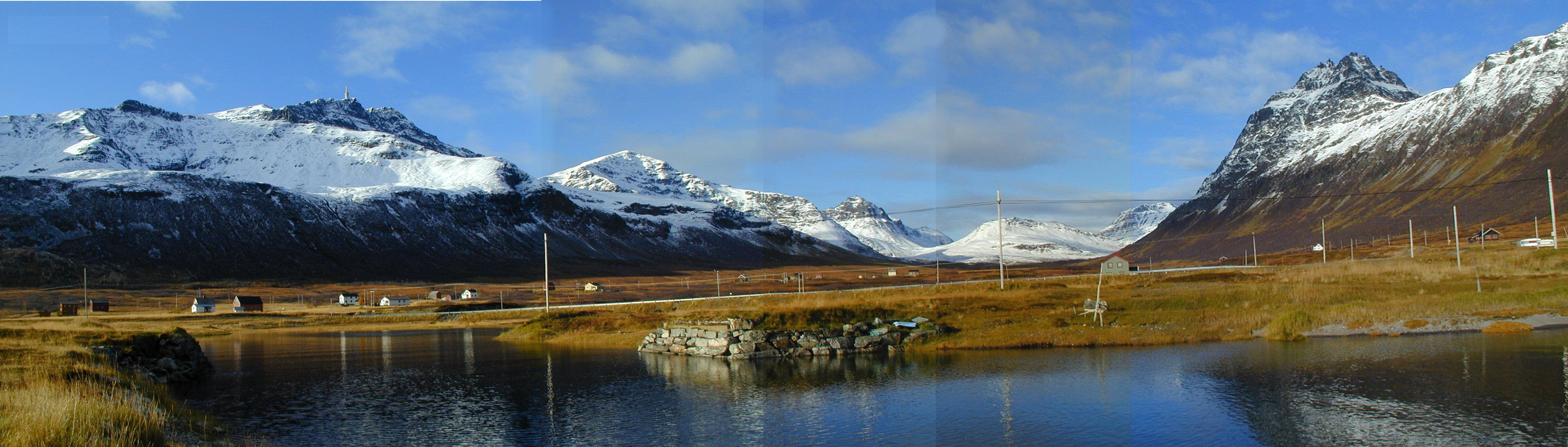 Akkarvik i Troms. Panoramabilde sett fra utløpet av Storelva. Trolltinden til venstre og Lappeguden til høyre.